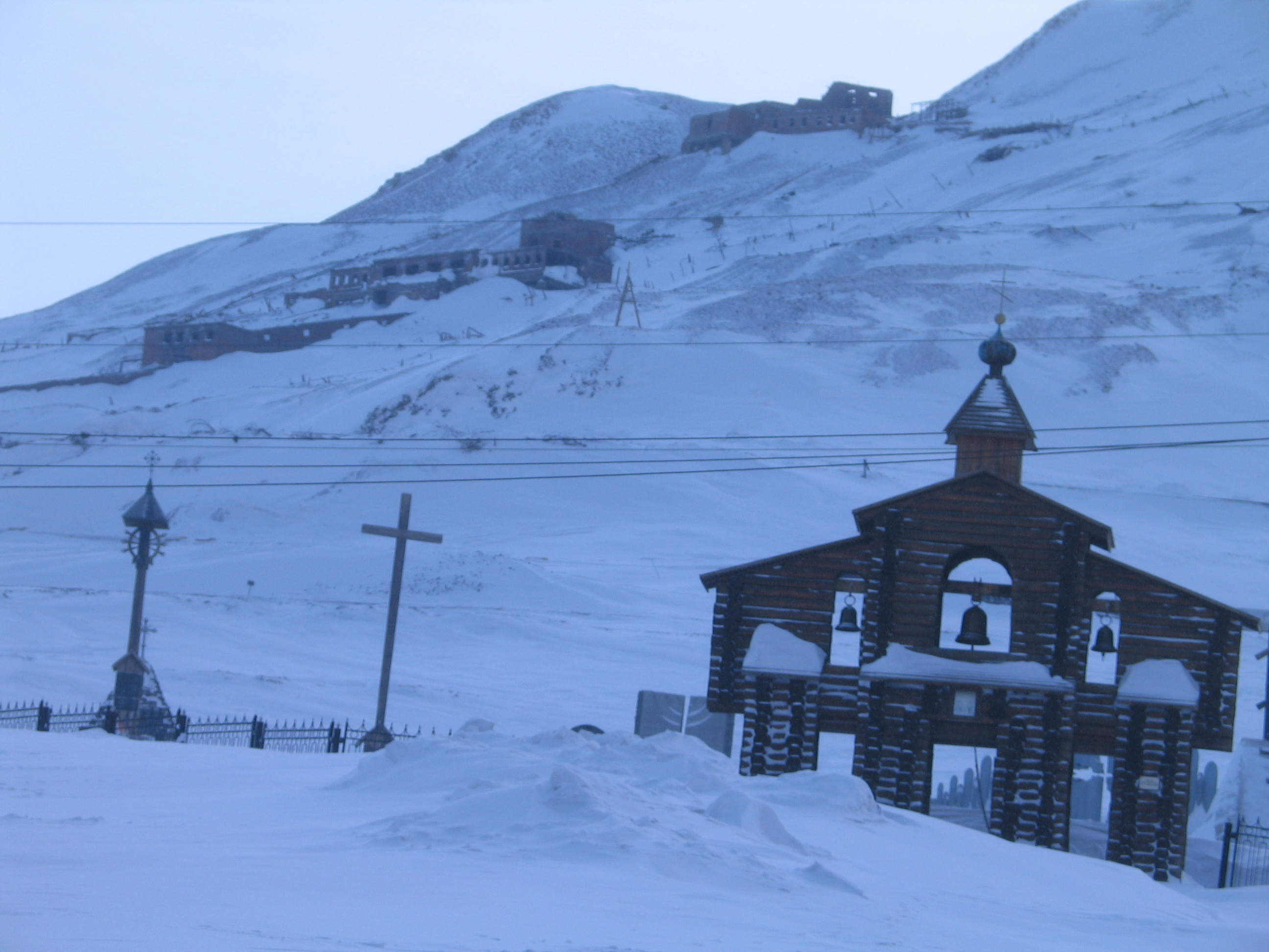 Звонница и кресты мемориала «Норильская Голгофа» на фоне горы Шмидта, автор Евгений Георгиевич Солнышкин.